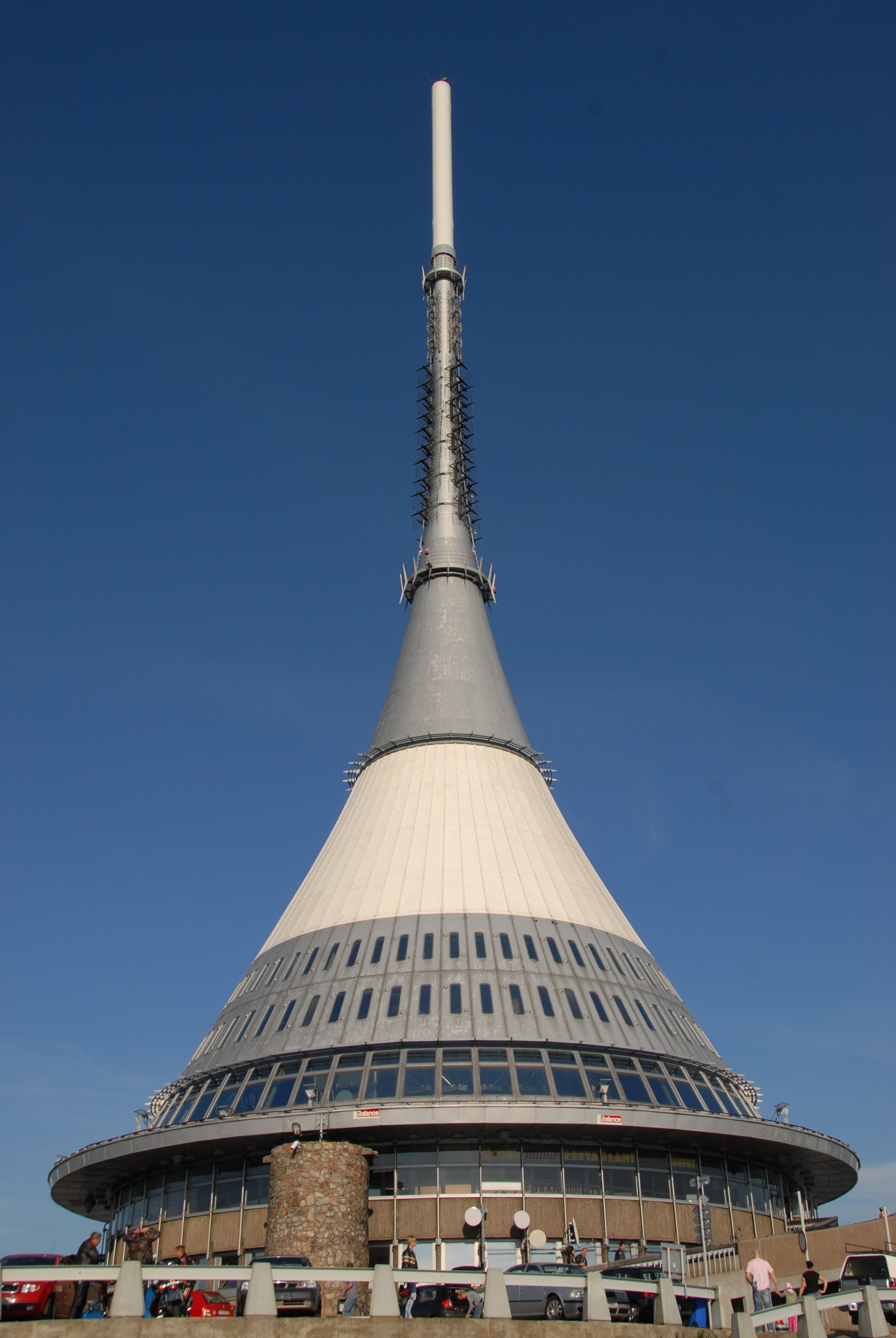 Ještědský vysílač